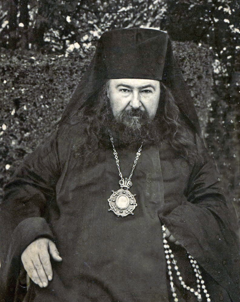 Архиепископ Гавриил (Чепур)